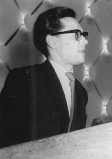 Zentralbild Loewe 4.10.1958 - CDU-Parteitag in Dresden (3. Oktober 1958). Der katholische Komponist Wolfgang Schoor während seines Diskussionsbeitrages.